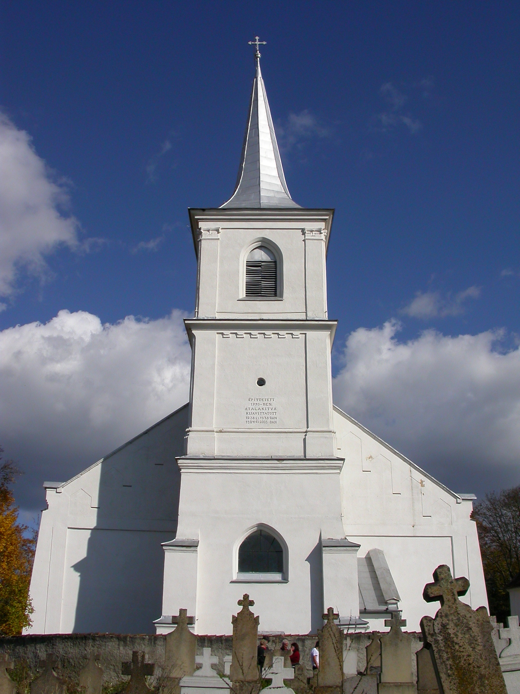 Ansamblul bisericii romano-catolice "Christos Rege" sec. XIV - XX